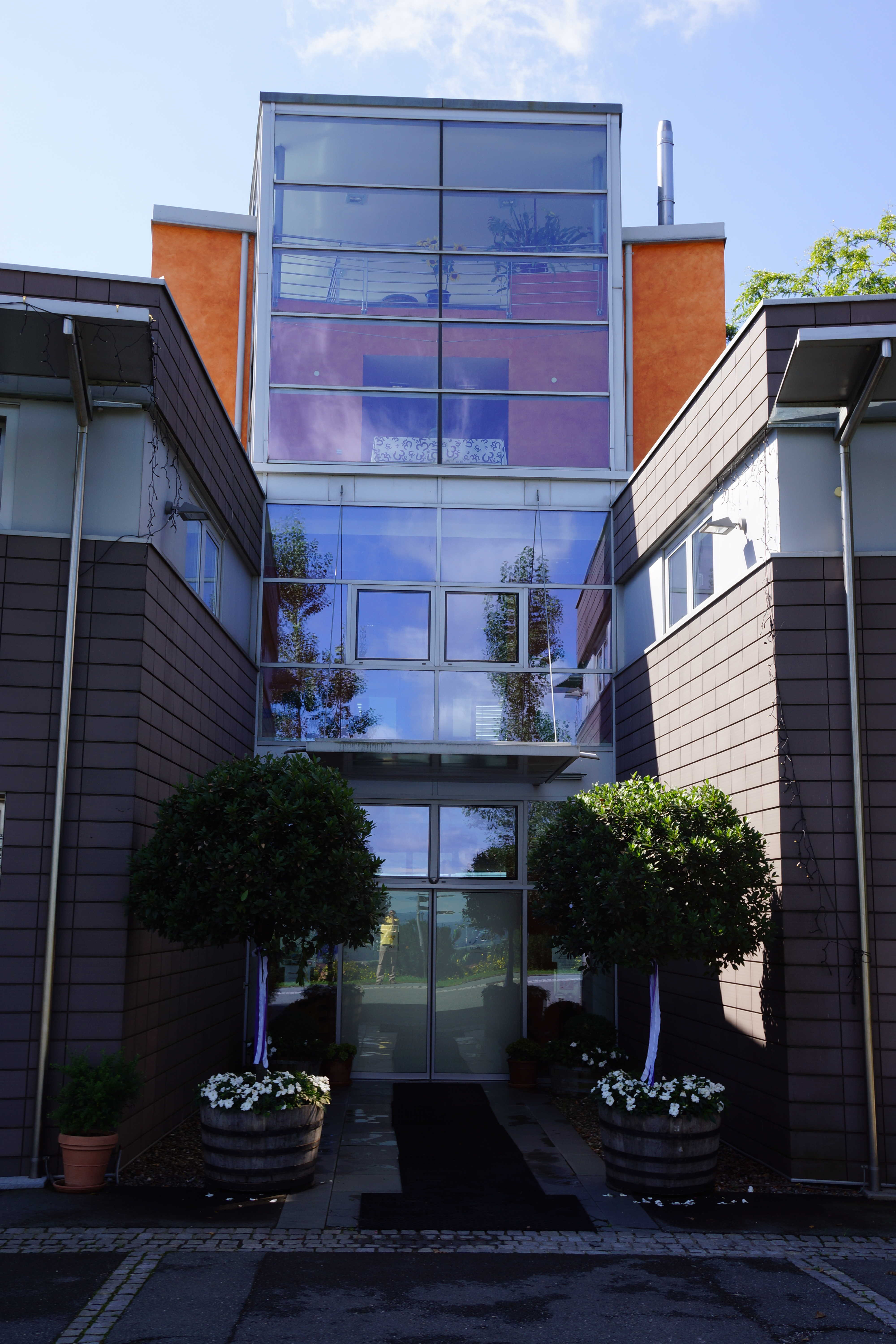 Außenansicht Treppenturm